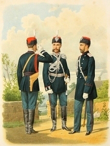 Корпус Жандармов. Штаб-офицер в парадной форме, Обер-офицер в сюртуке и Унтер-офицер в парадной и обыкновенной форме. ( приказы по воен. вед. 1884 г. №№ 20 и 105. )